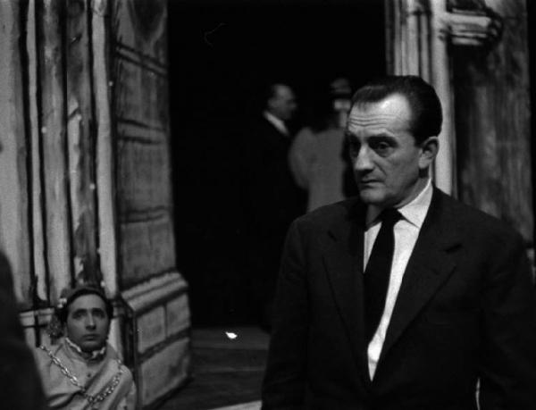 Milano: Teatro alla Scala - Spettacolo Anna Bolena, 1957, regia di Luchino Visconti - Backstage - Luchino Visconti con attori sullo sfondo